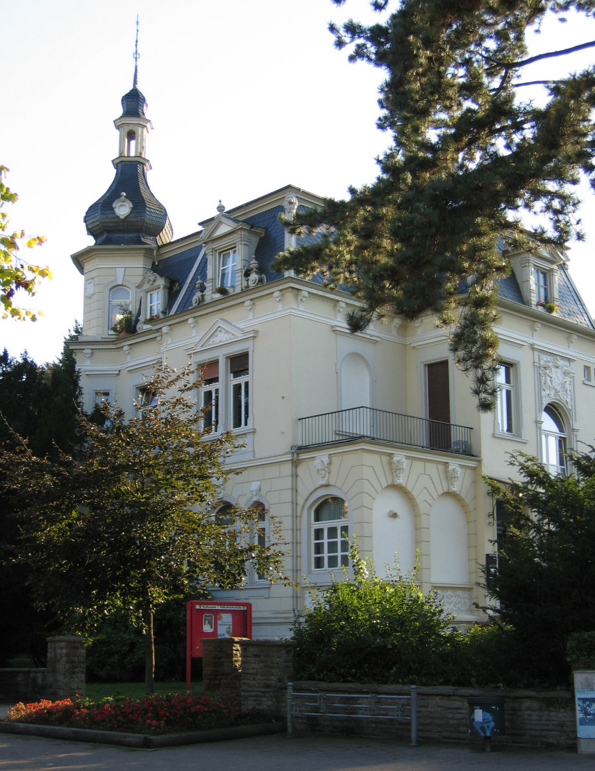 Türmchenvilla "Villa Prinz" (Denkmal seit 1982) in Hemer.